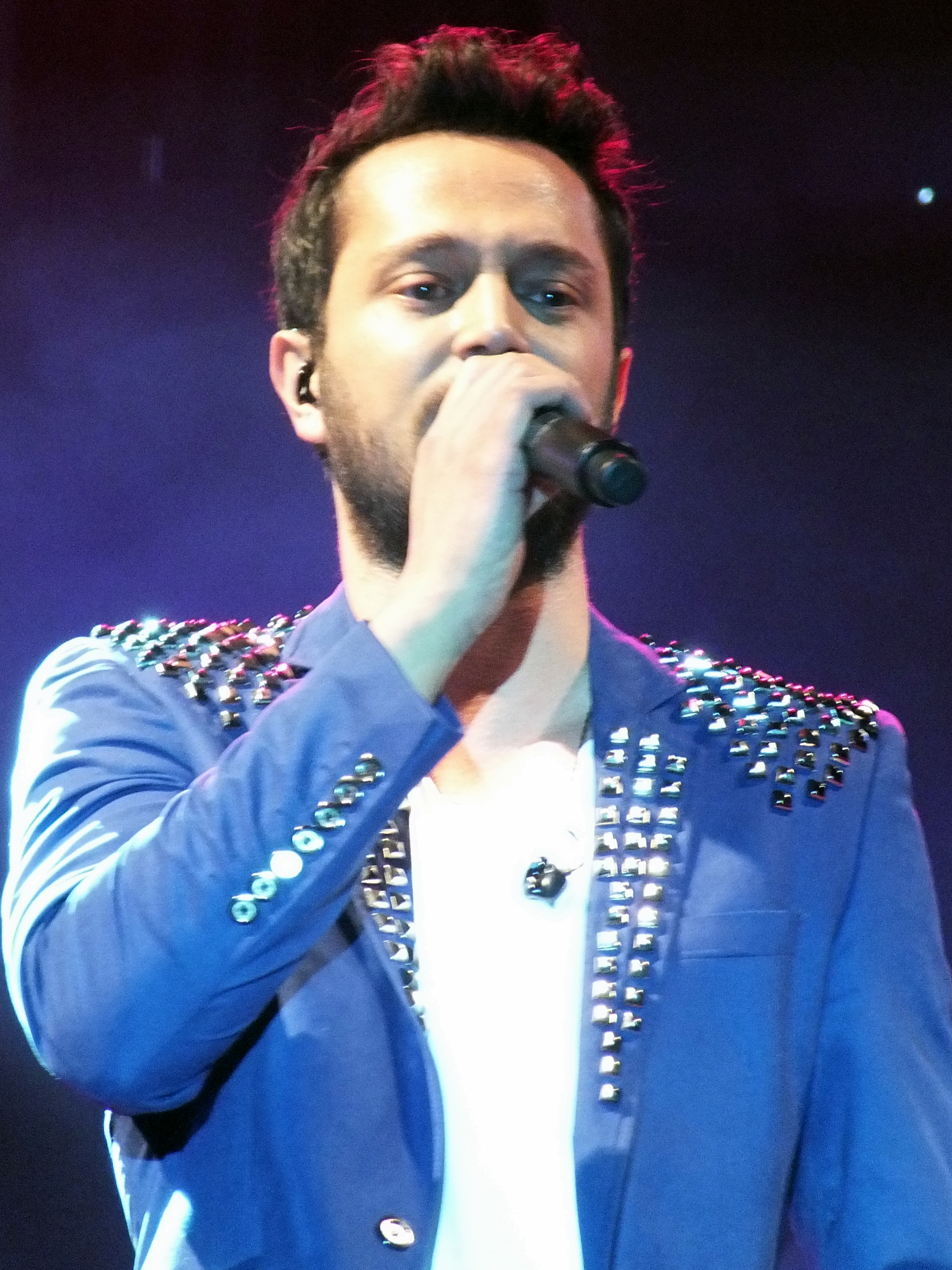 2012 Silifke Bahar Konserleri'nden bir kare.